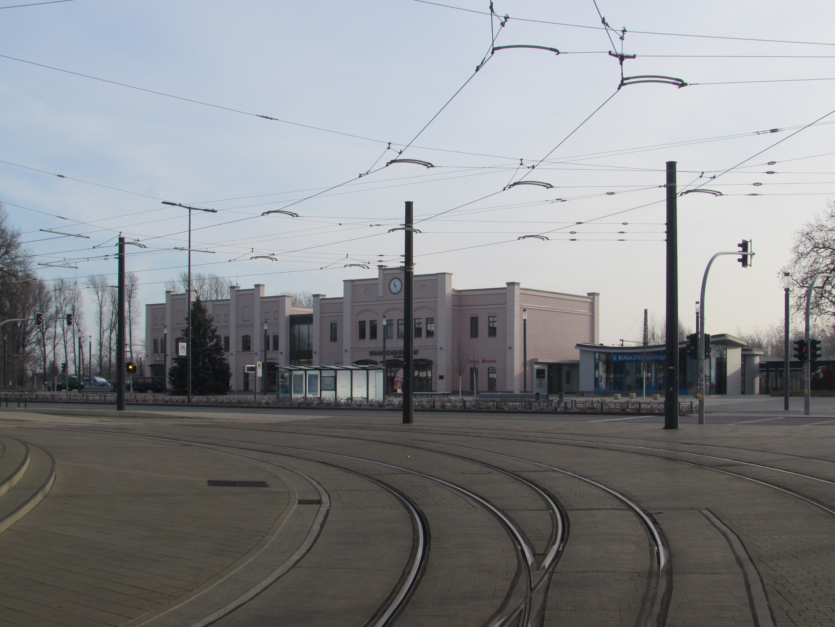 hauptbahnhof brandenburg